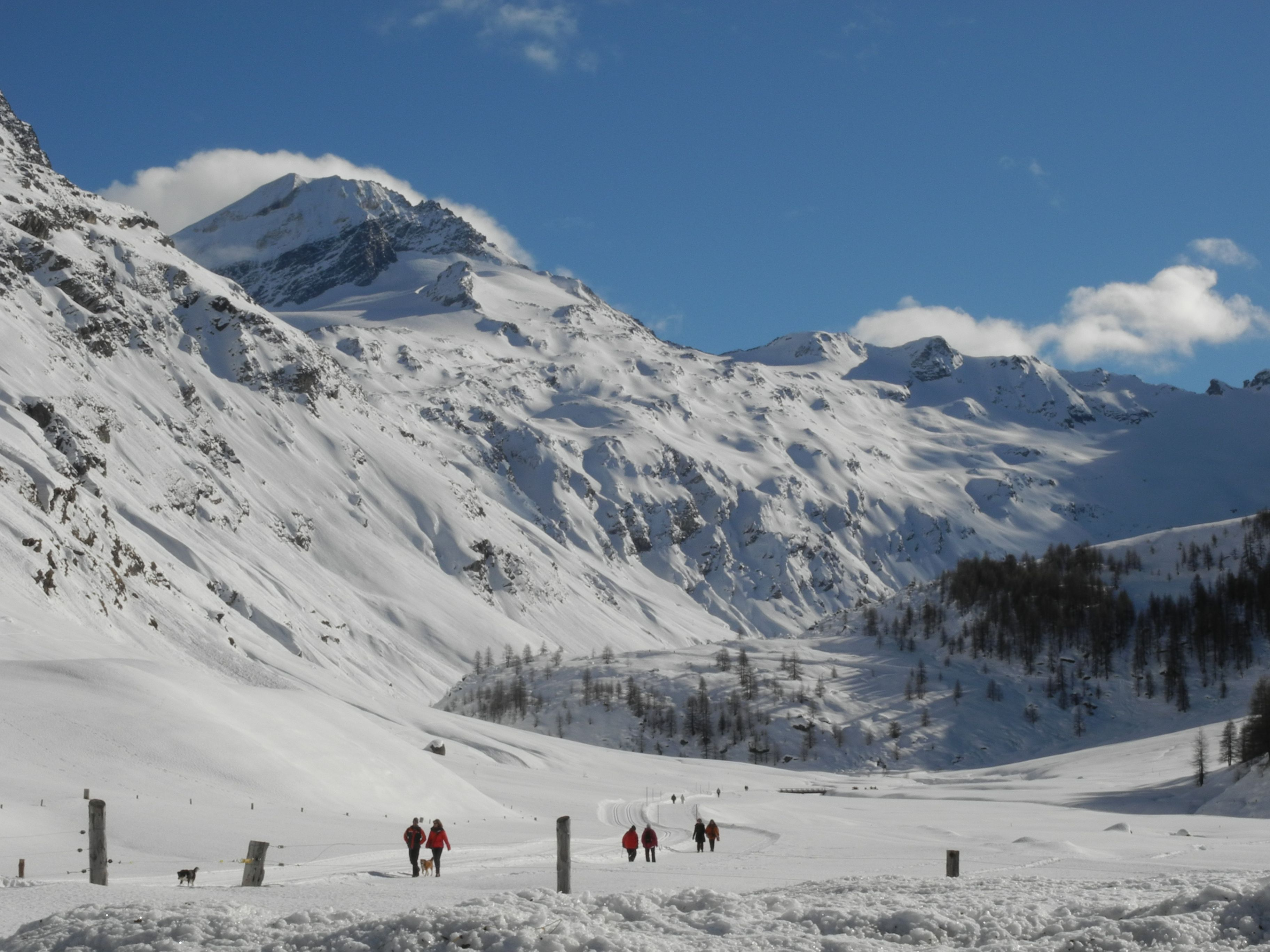 \Sils -Val Fex im Winter- Il Chapütschin li,La Mongia re